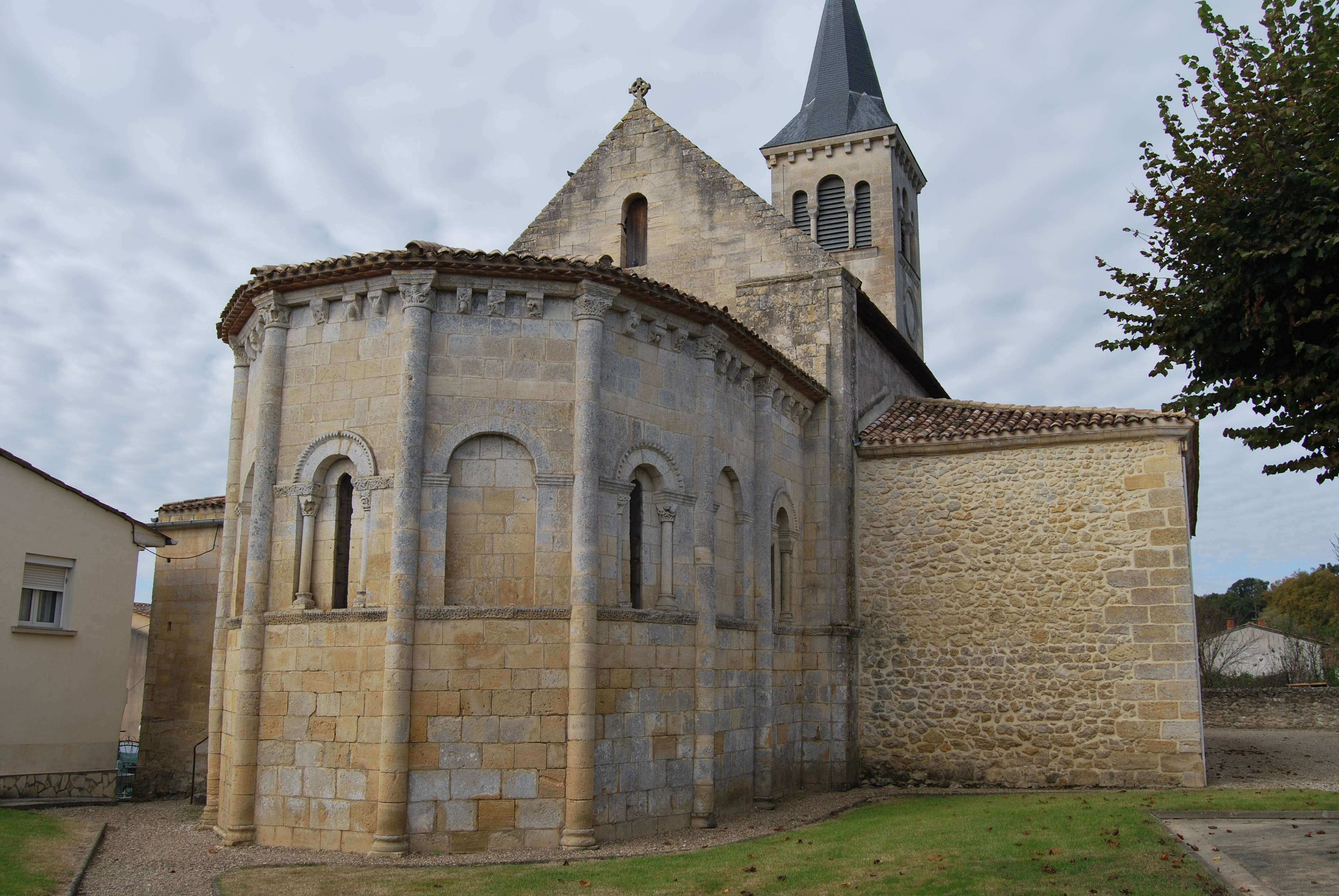 Église Notre-Dame de Lestiac-sur-Garonne